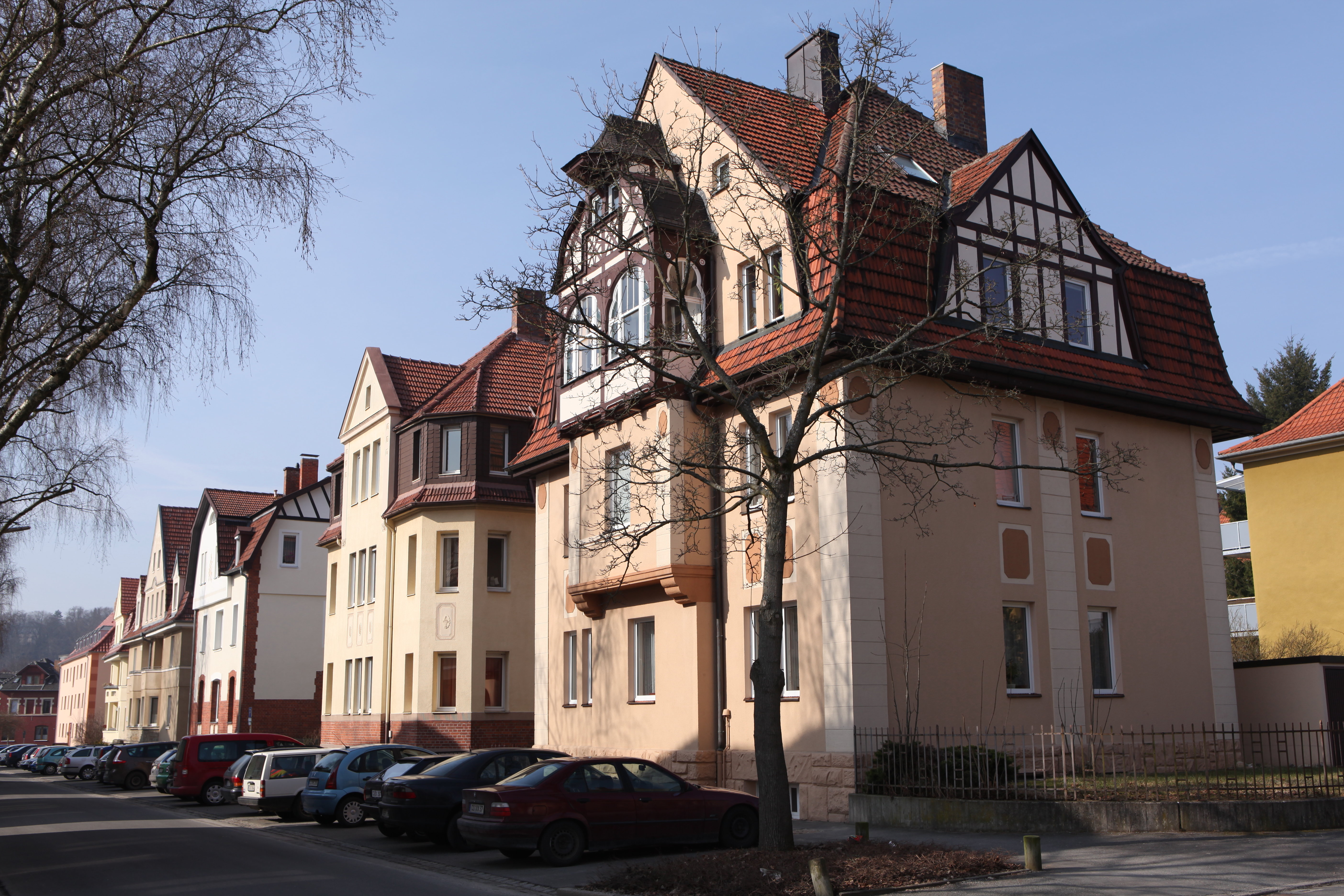 Lutherstraße in Coburg